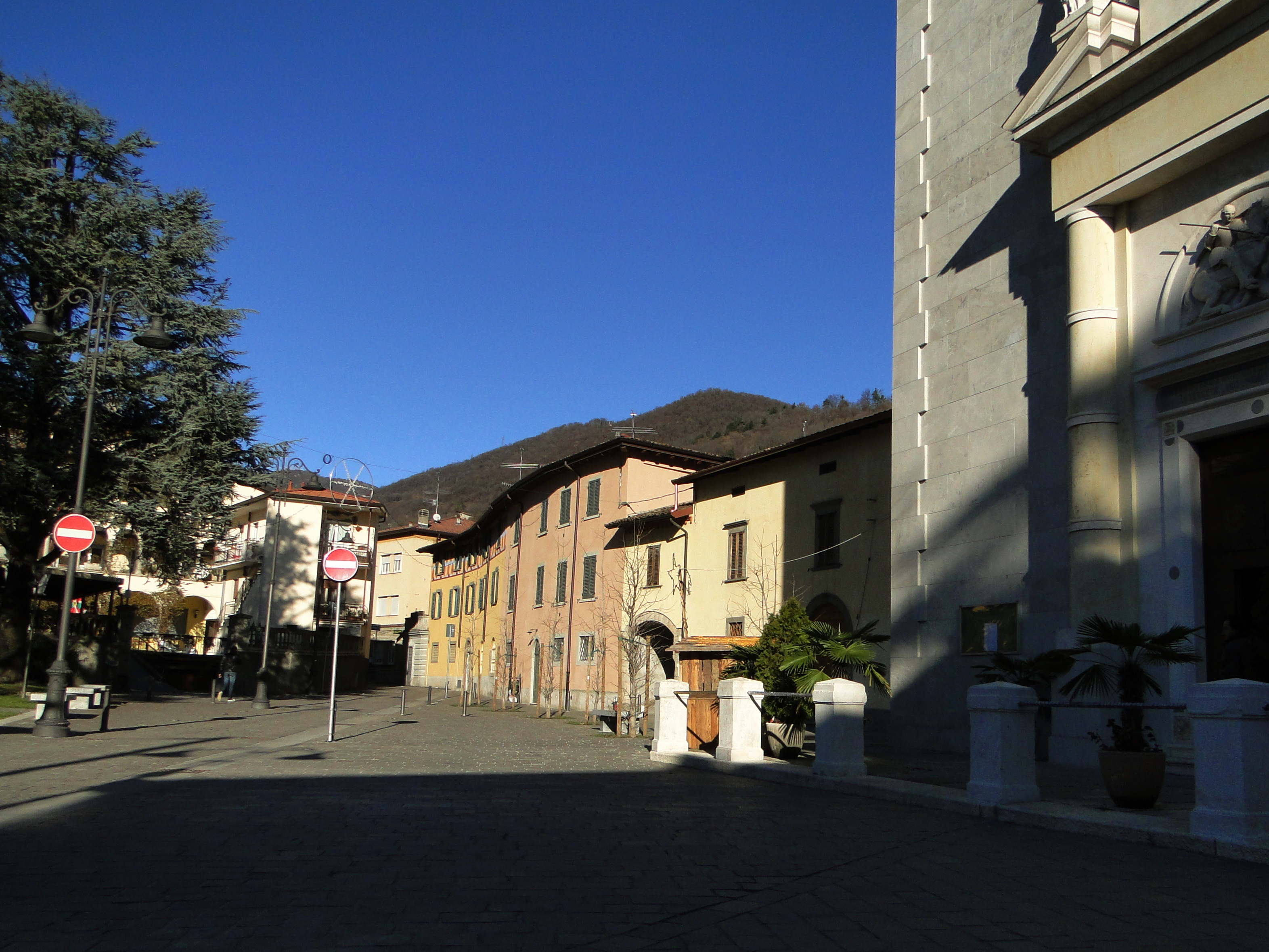 Nese, fraz. di Alzano Lombardo (BG). Piazza